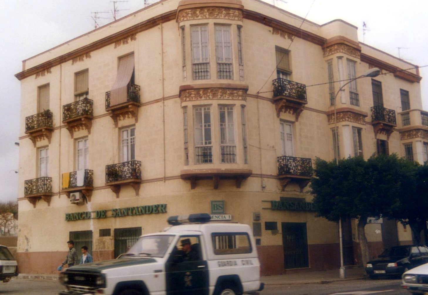 General Polavieja, 62